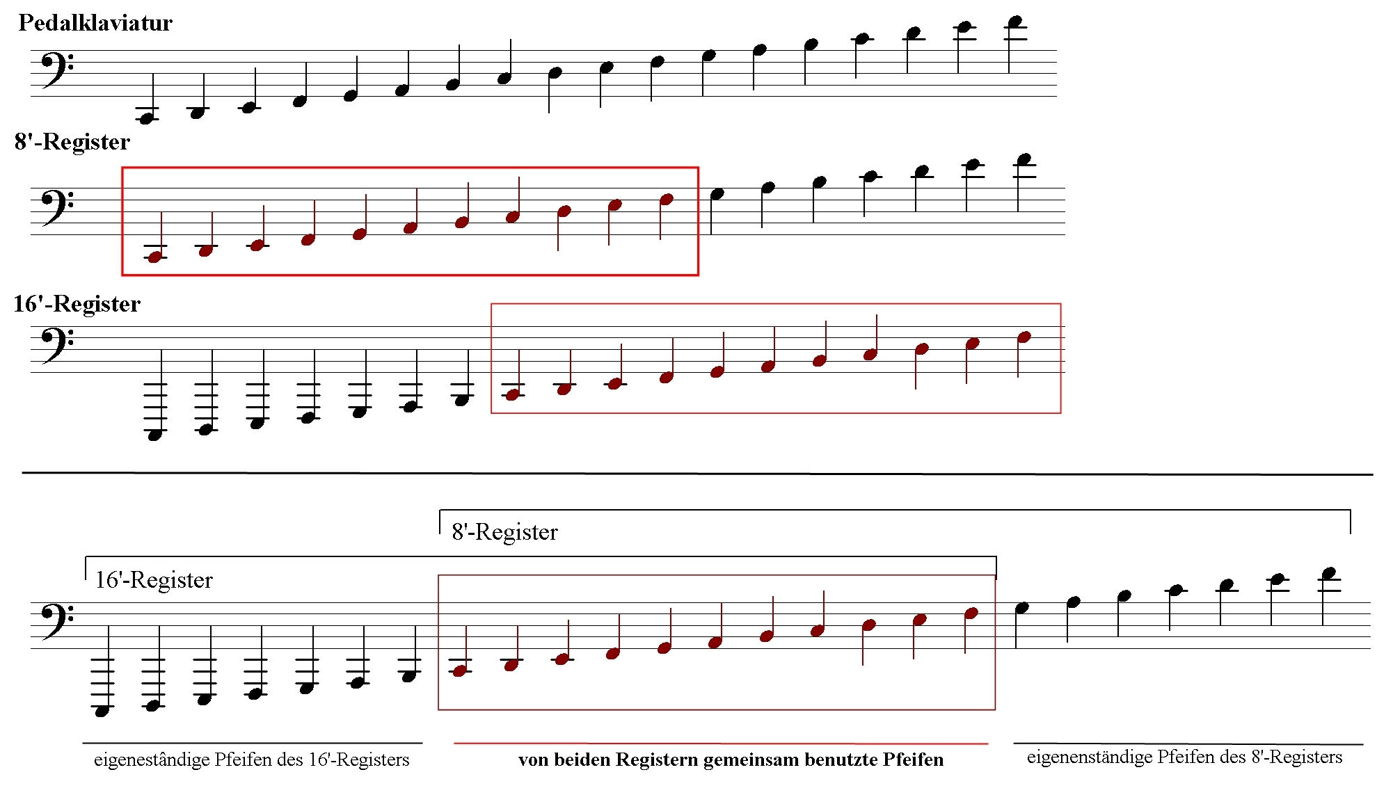 Illustration des Extensionsverfahren einer Orgel.